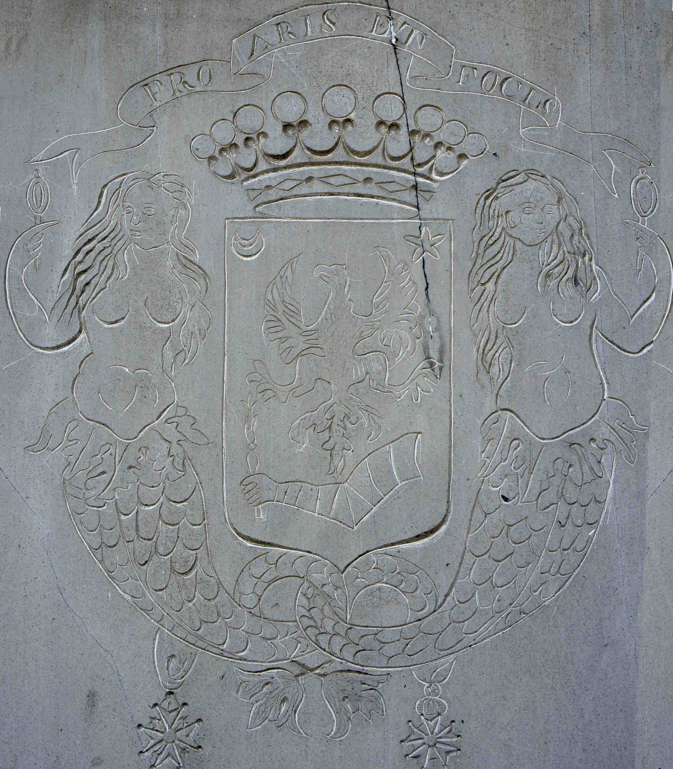 Blason de Louis_César_Hyacinthe_Dessoffy_de_Csern_et_Tarko_magnat_de_Hongrie sur sa tombe au cimetière de Moncetz. Colonel de la cavalerie française, chevalier des ordres militaire de st-Louis et de la Légion d'honneur.